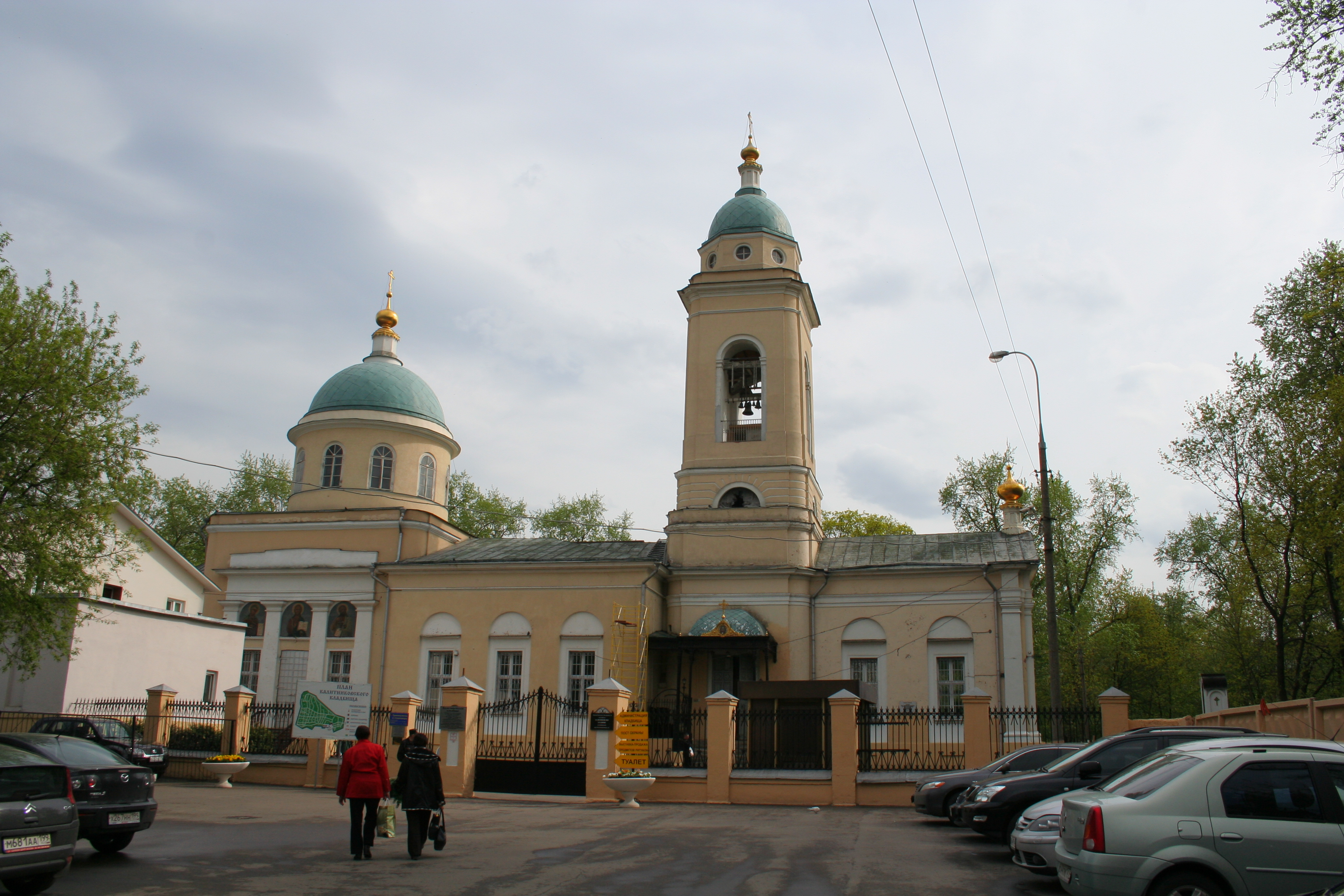 Kirche der Gottesmutter-Ikone „Allen Trauernden ihre Freude“ auf dem Friedhof Kalitniki in Moskau